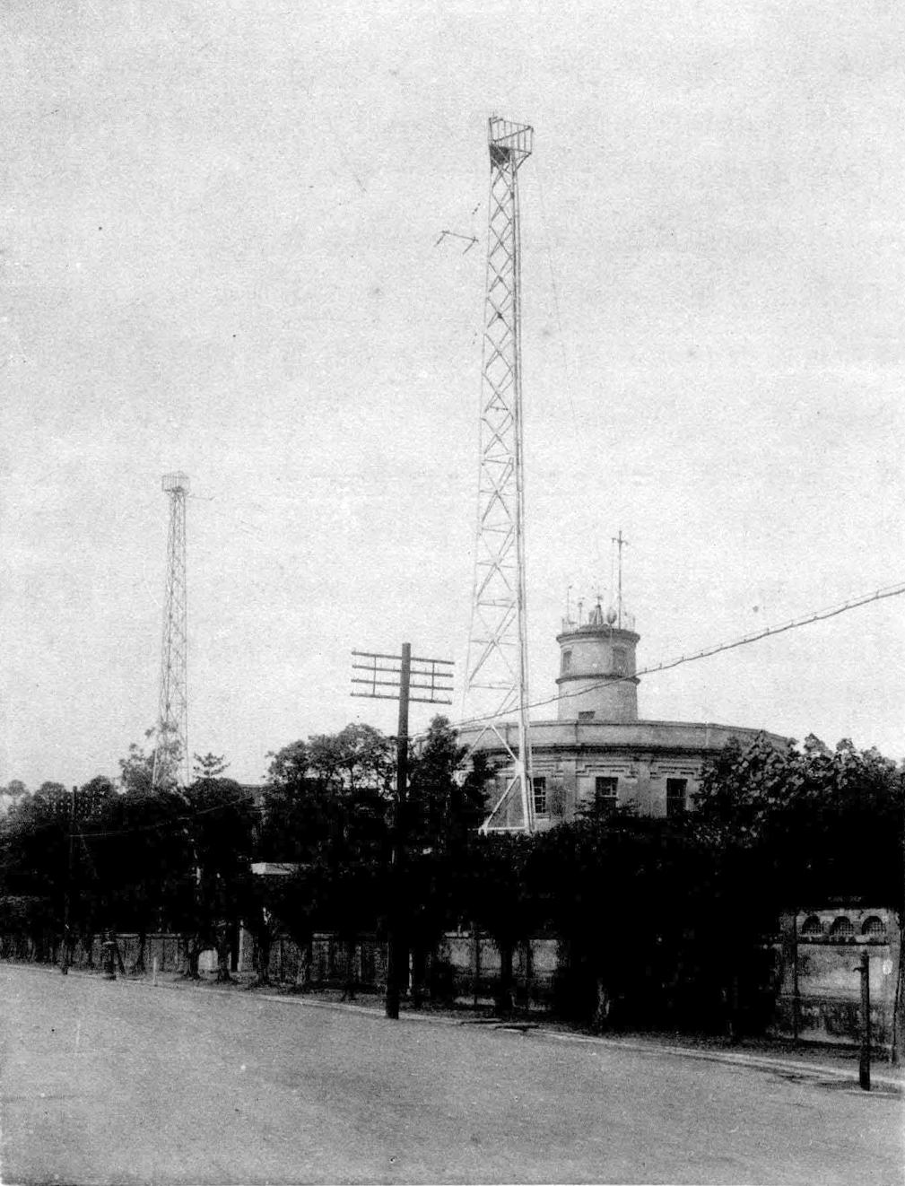 1897年所建的台北測候所，1937年改建為台灣總督府氣象臺